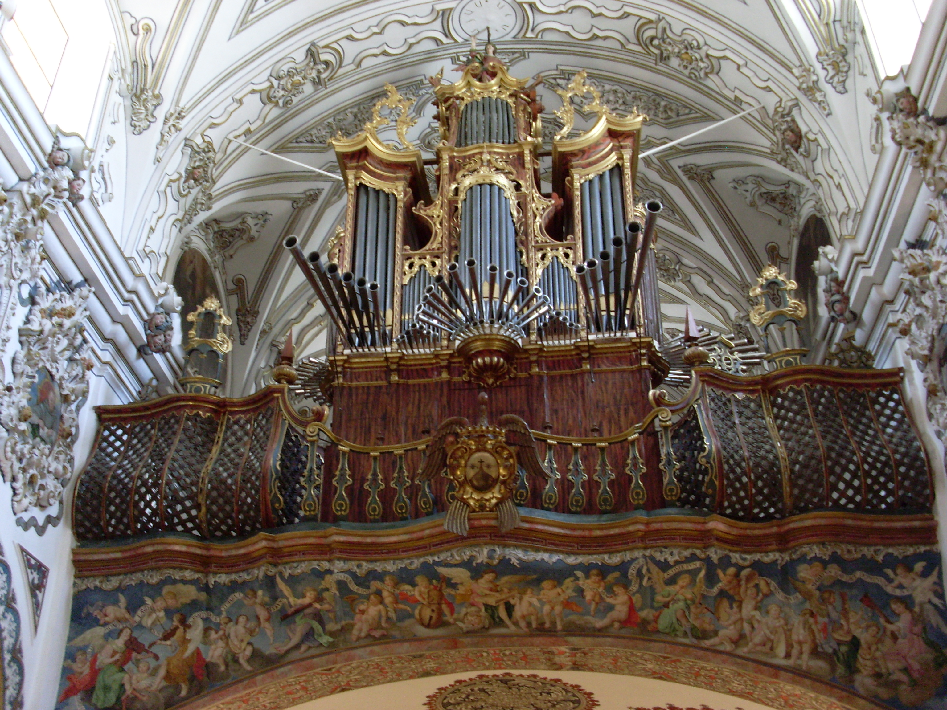 Órgano Barroco de la Iglesia de los Descalzos de Écija.